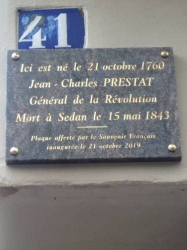 Plaque posée